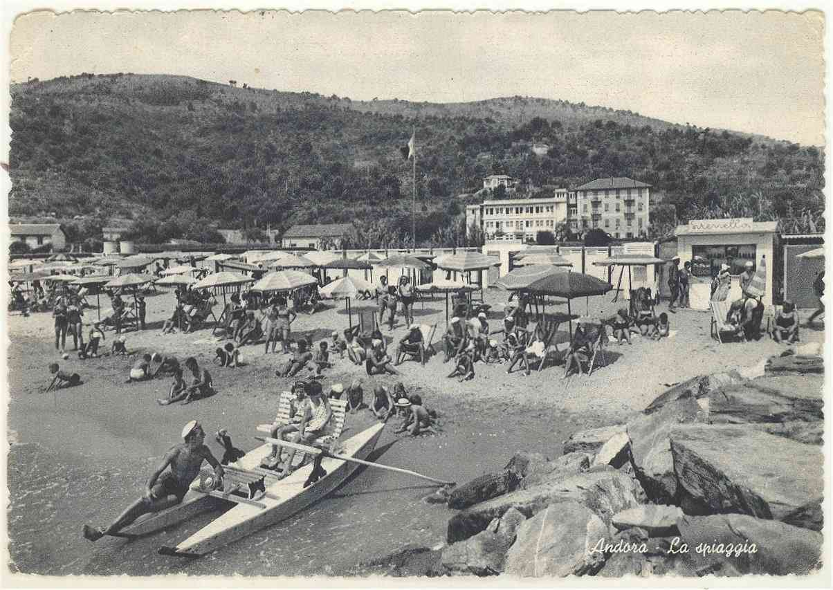 SV Andora - la spiaggia